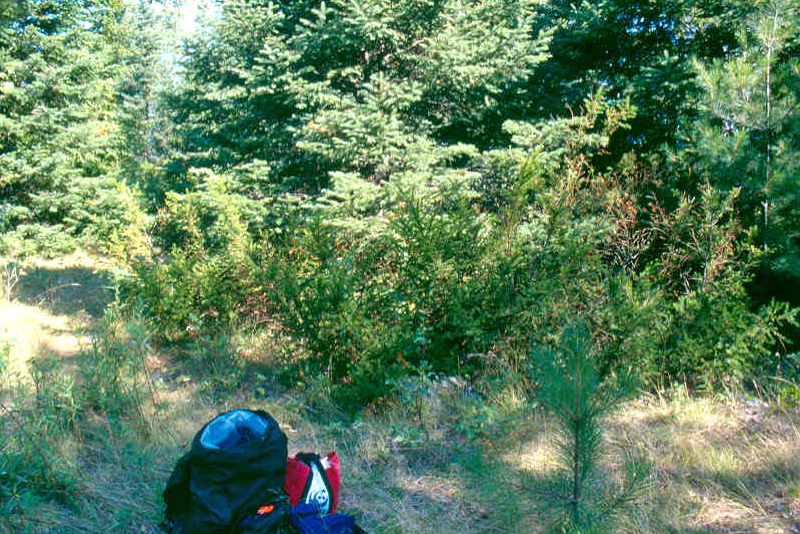 Taxus canadensis 2-eheep